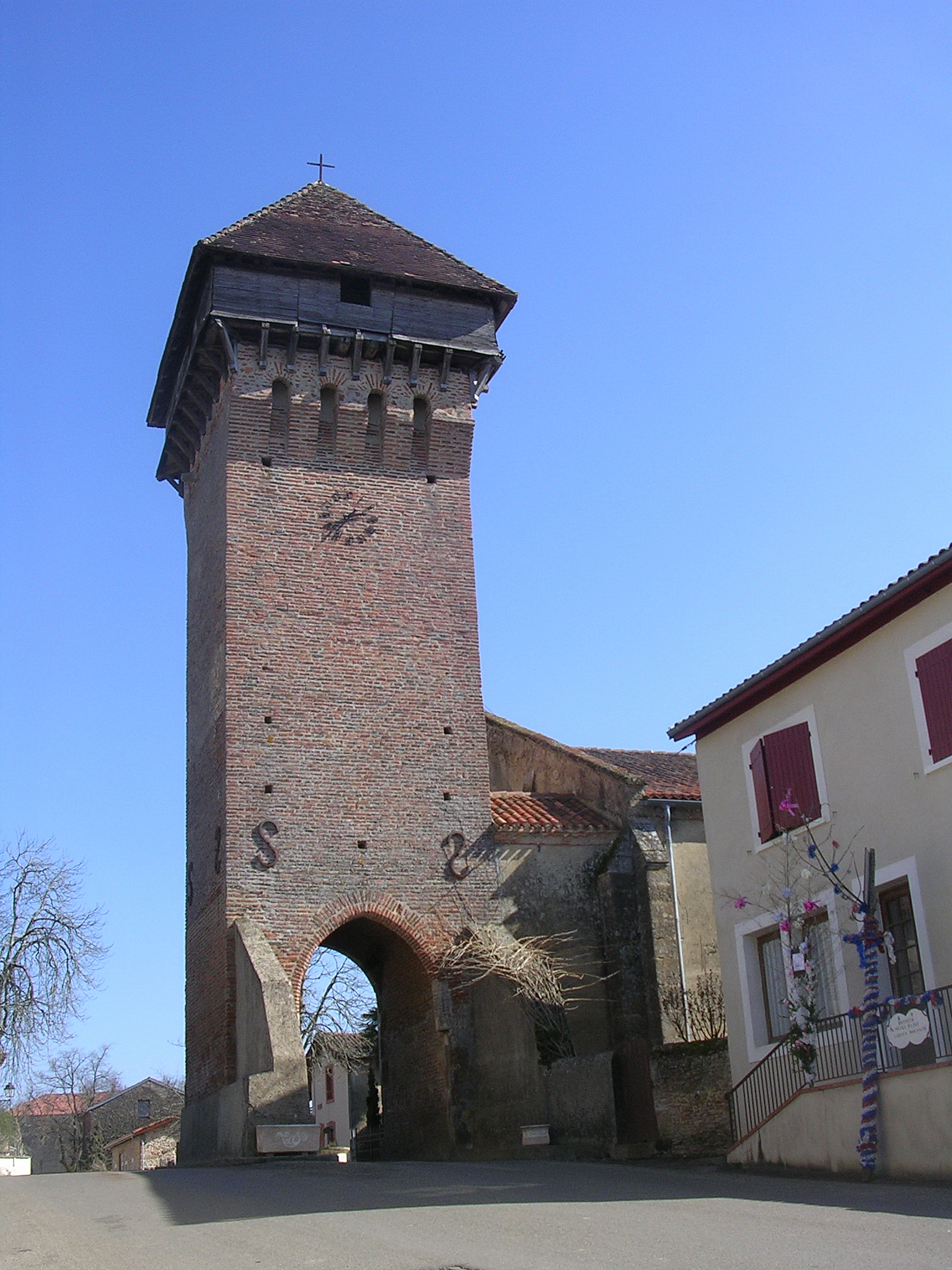 Tour clocher de l'église paroissiale Saint-Martin à Hontanx, dans le département français des Landes